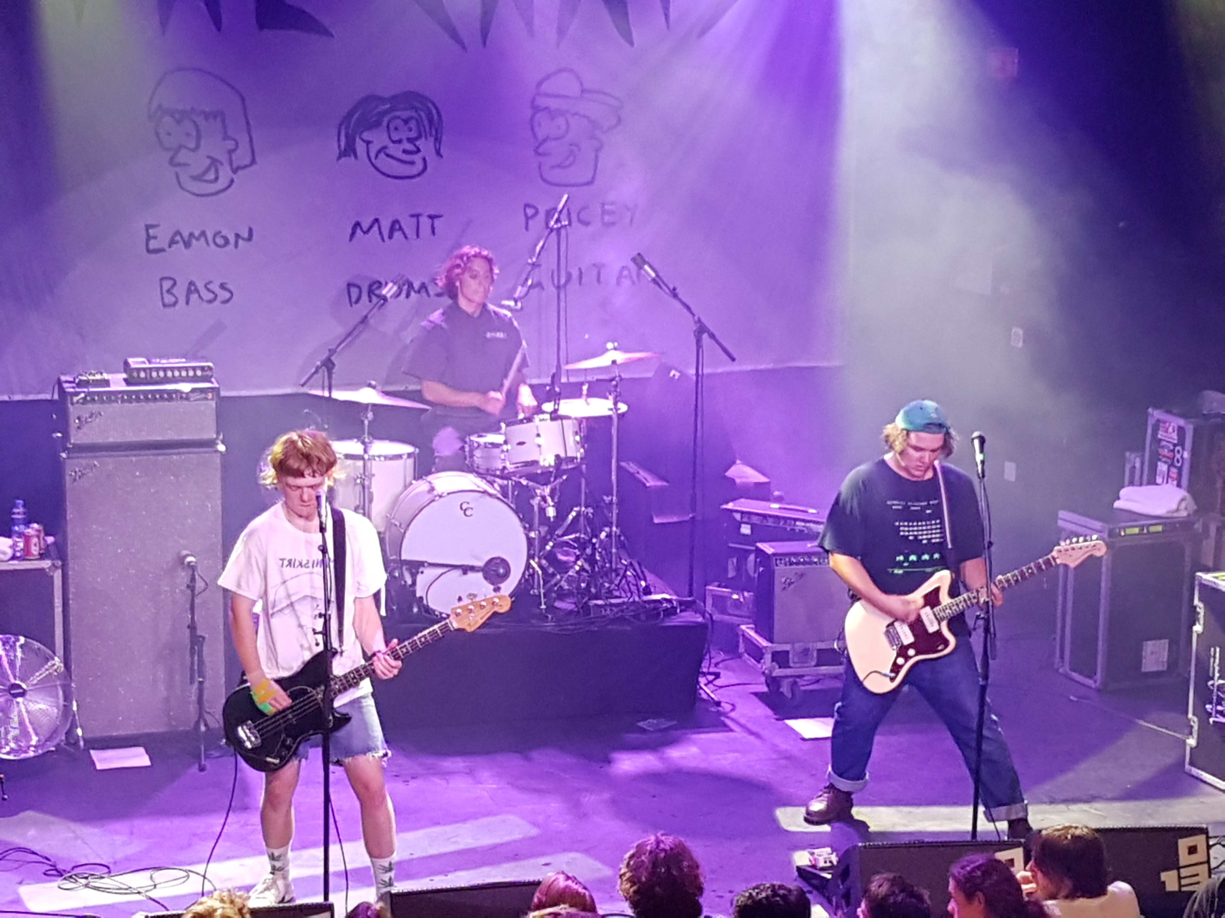 Optreden The Chats in Tilburg (013)